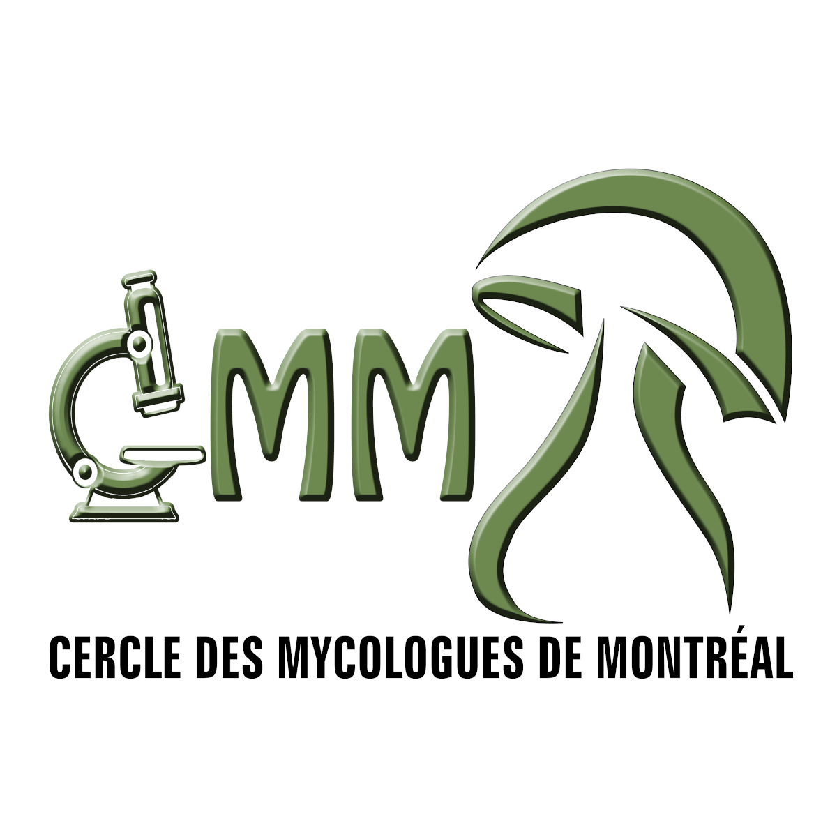 Logo du Cercle des mycologues de Montréal